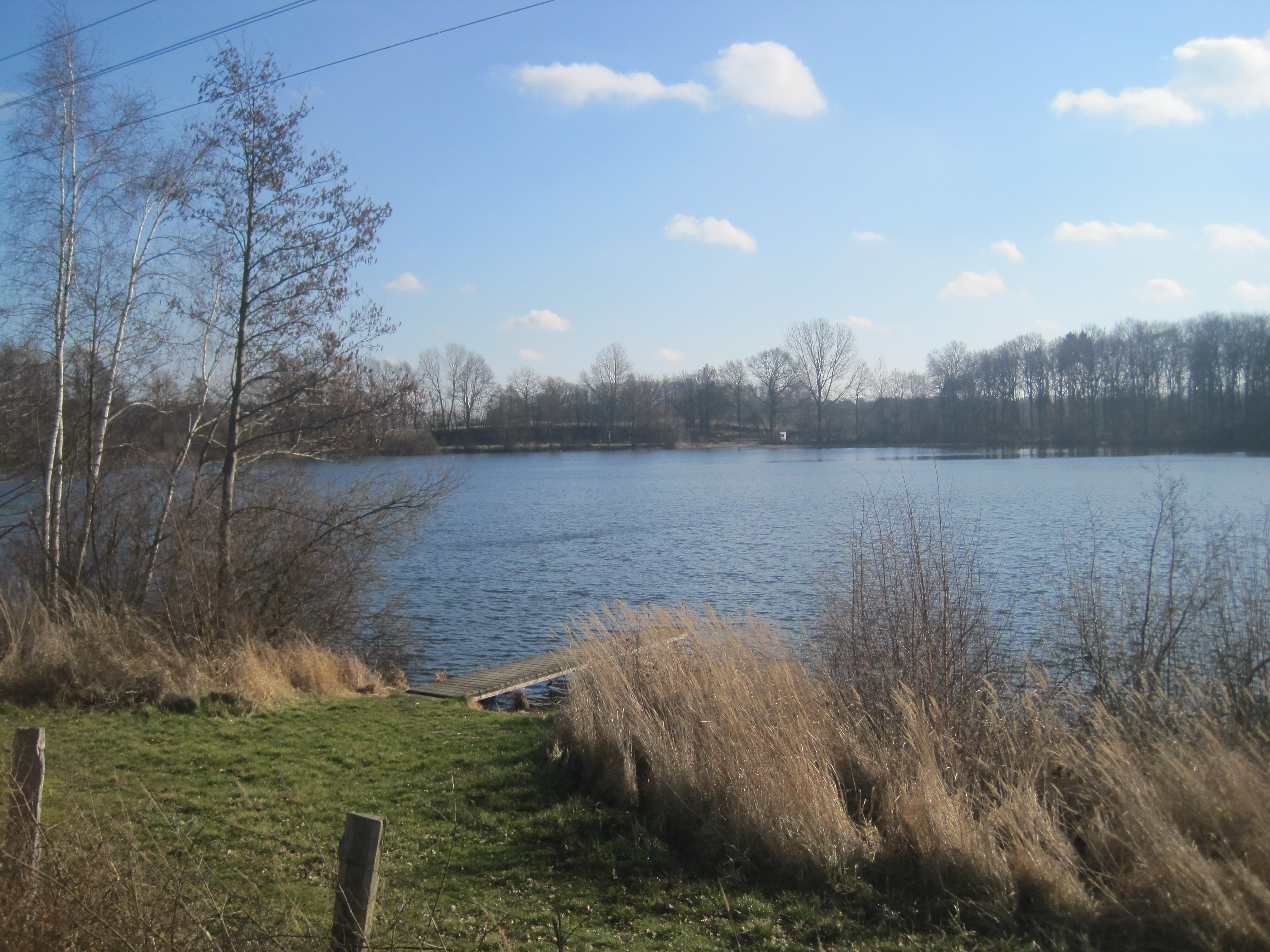 Beidendorfer See bei Lübeck.